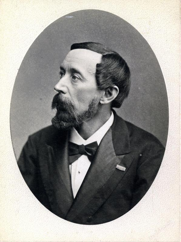 Richard Genée